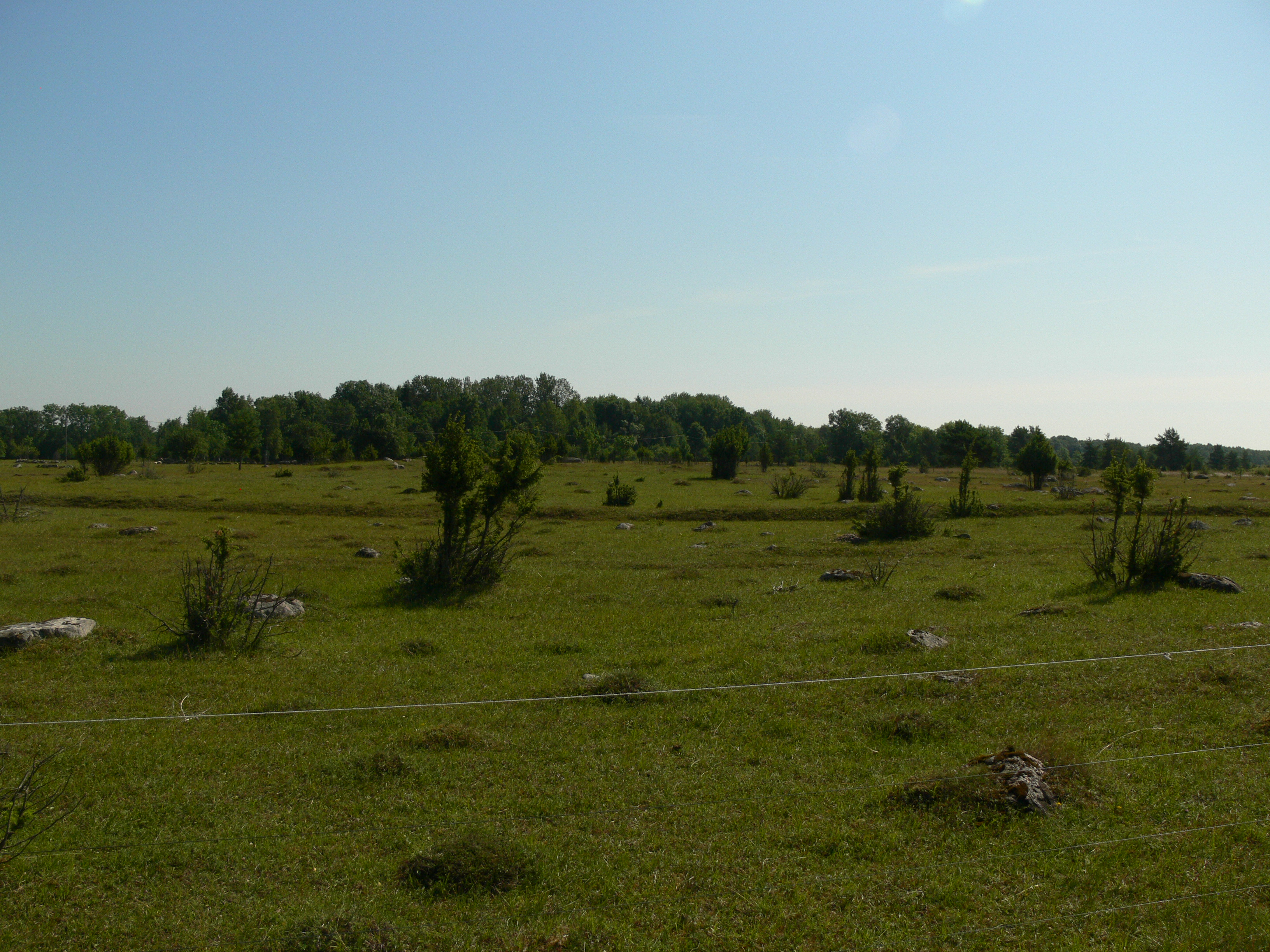 Matsalu Rahvuspark, Kirikuküla